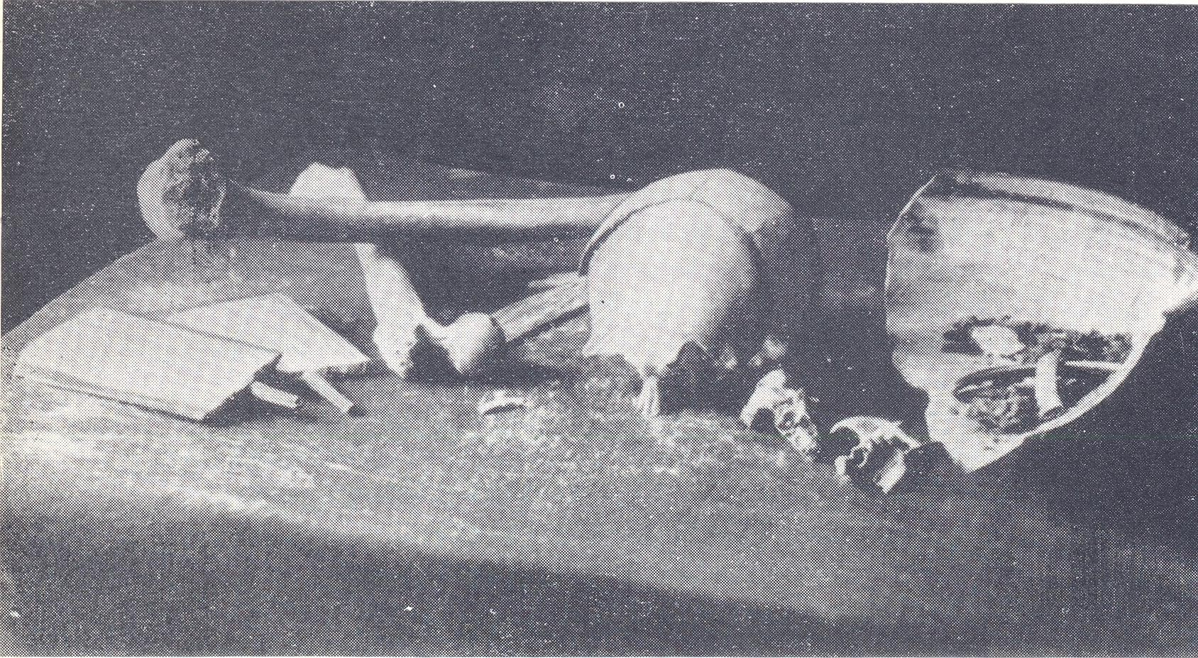 Kosterní pozůstatky z tzv. čáslavského nálezu. Některé z ostatků s velkou pravděpodobností náleží husitskému vojevůdci Janu Žižkovi.